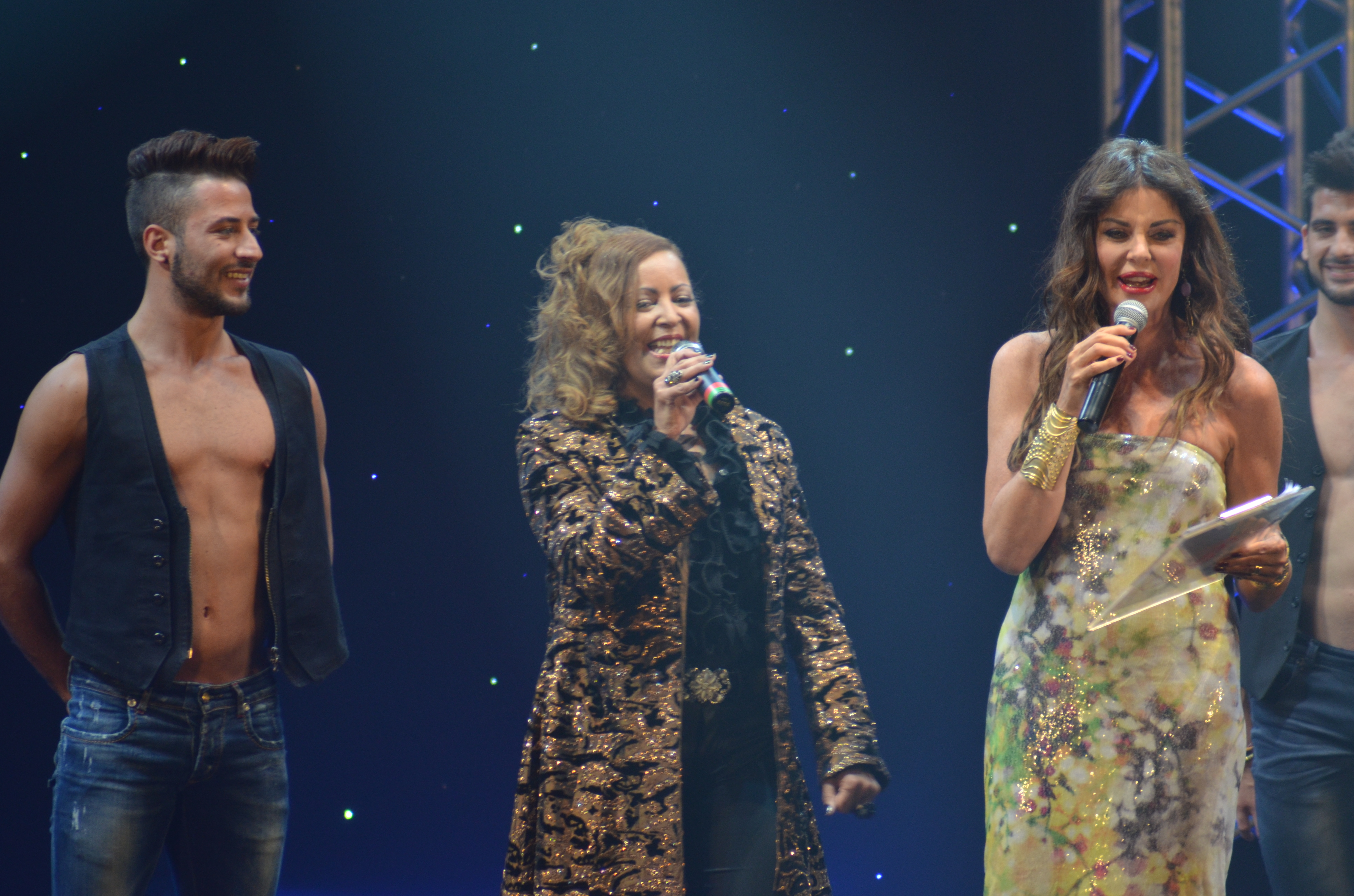 Alba Parietti entrevista a la Cantante Mariblanca Armenteros en su tour en Europa